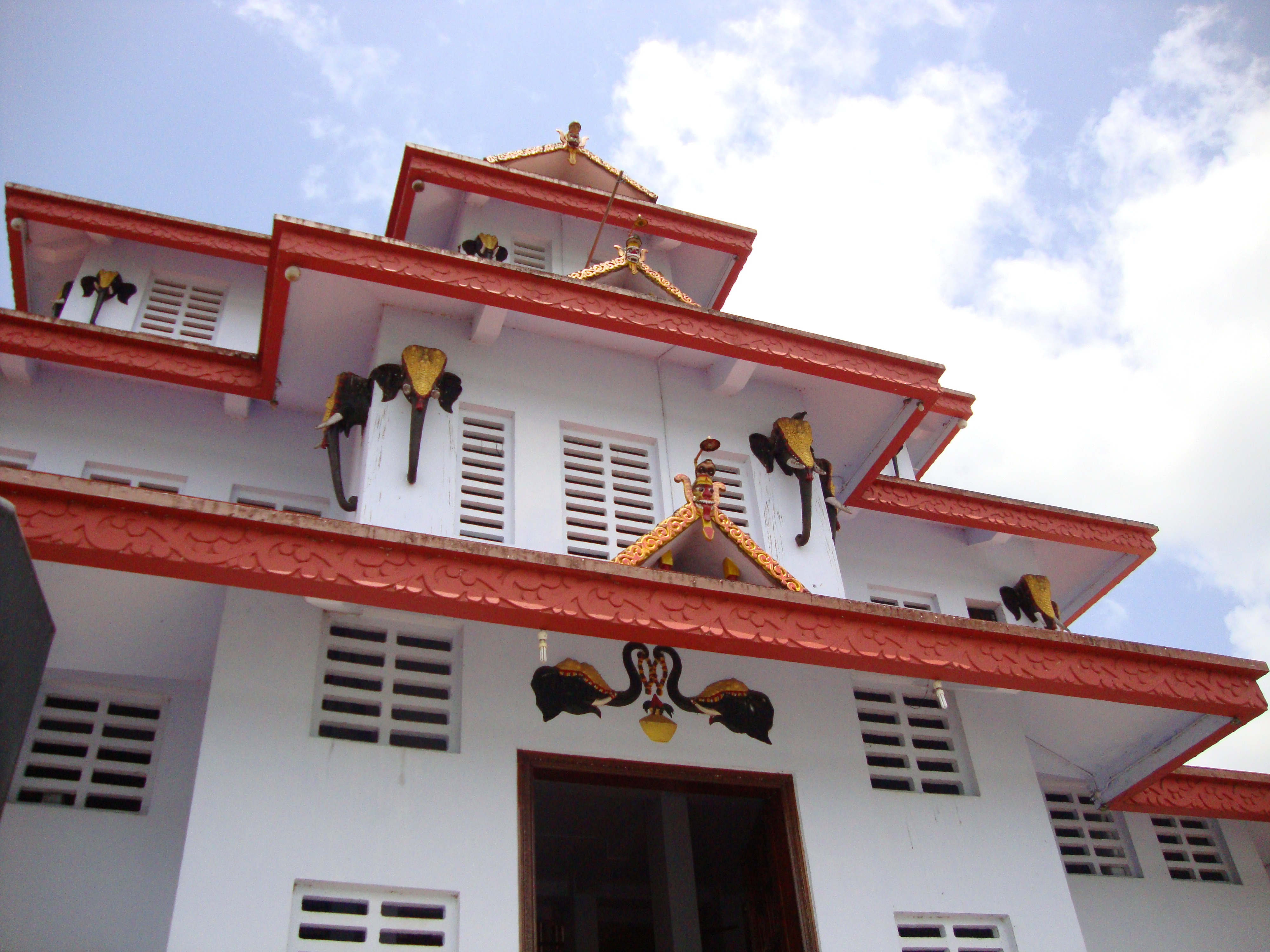 പറശ്ശിനിക്കടവ് മുത്തപ്പൻ ക്ഷേത്രം